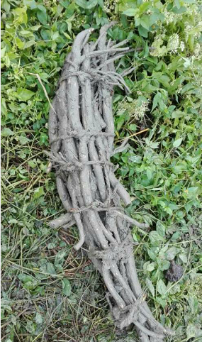 Jingtang Lotus Root